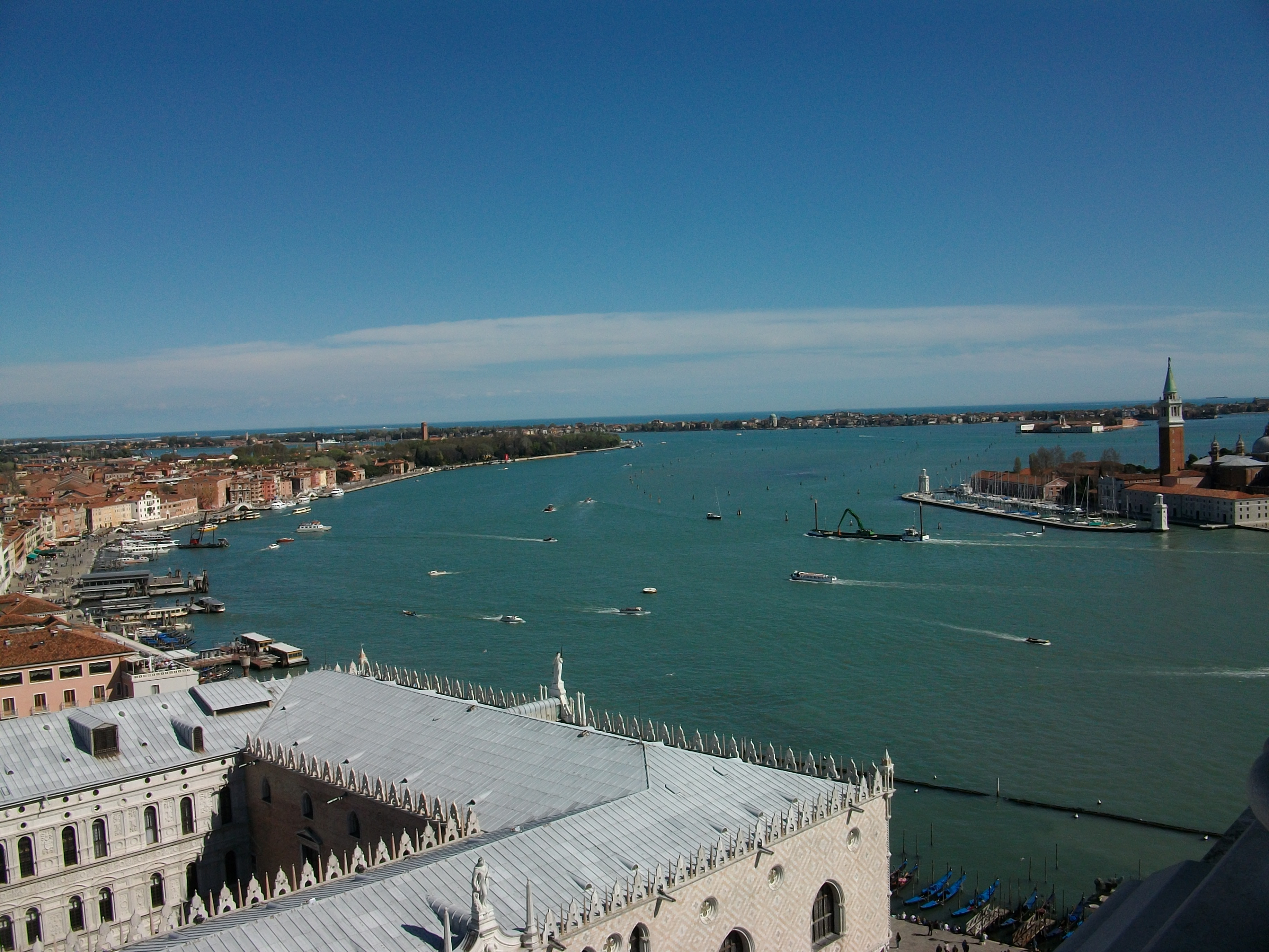 Bacino di San Marco des del campanar de sant Marc, Venècia.